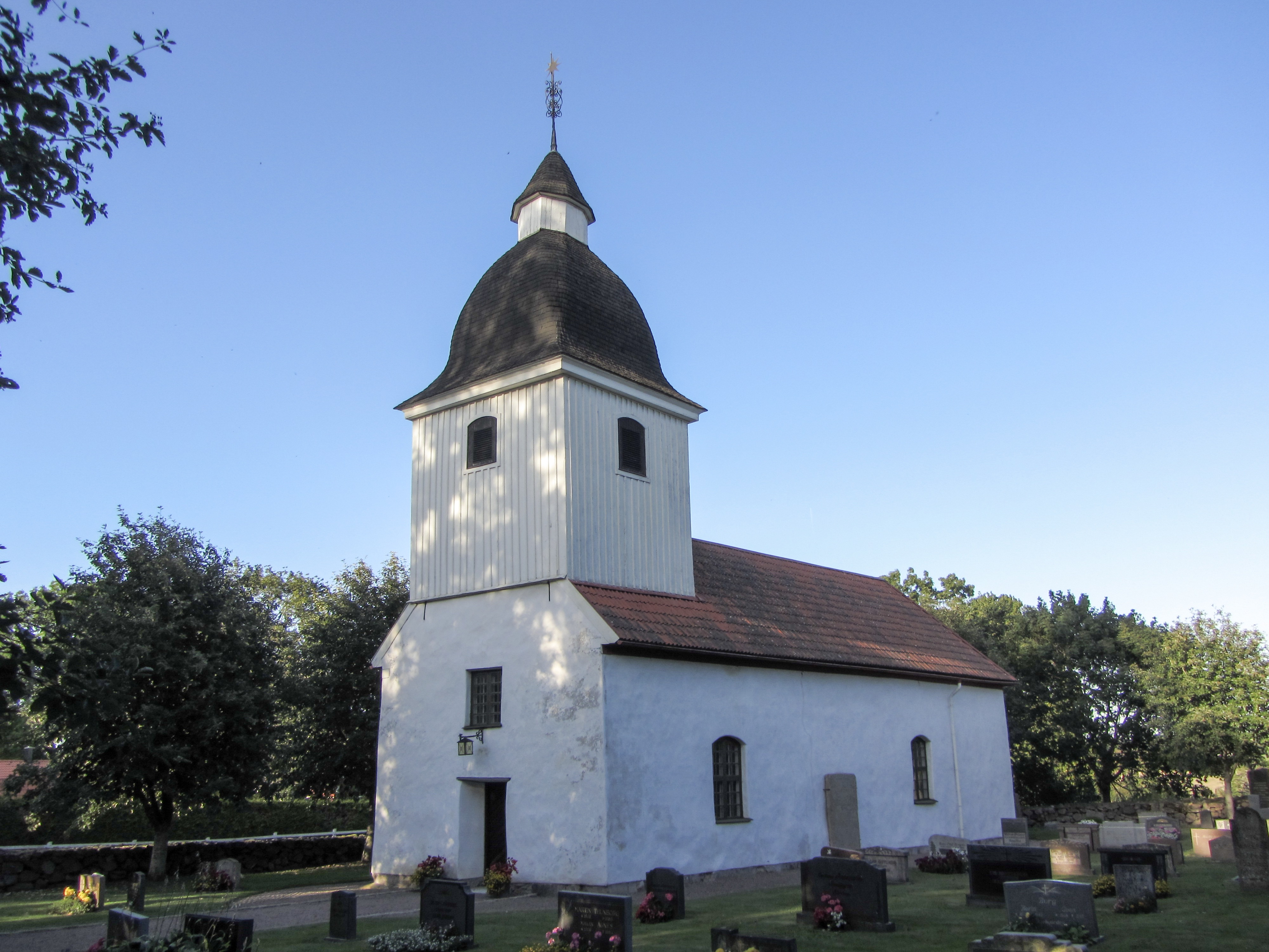 Binnebergs kyrka i södra Vadsbo härad, Västergötland